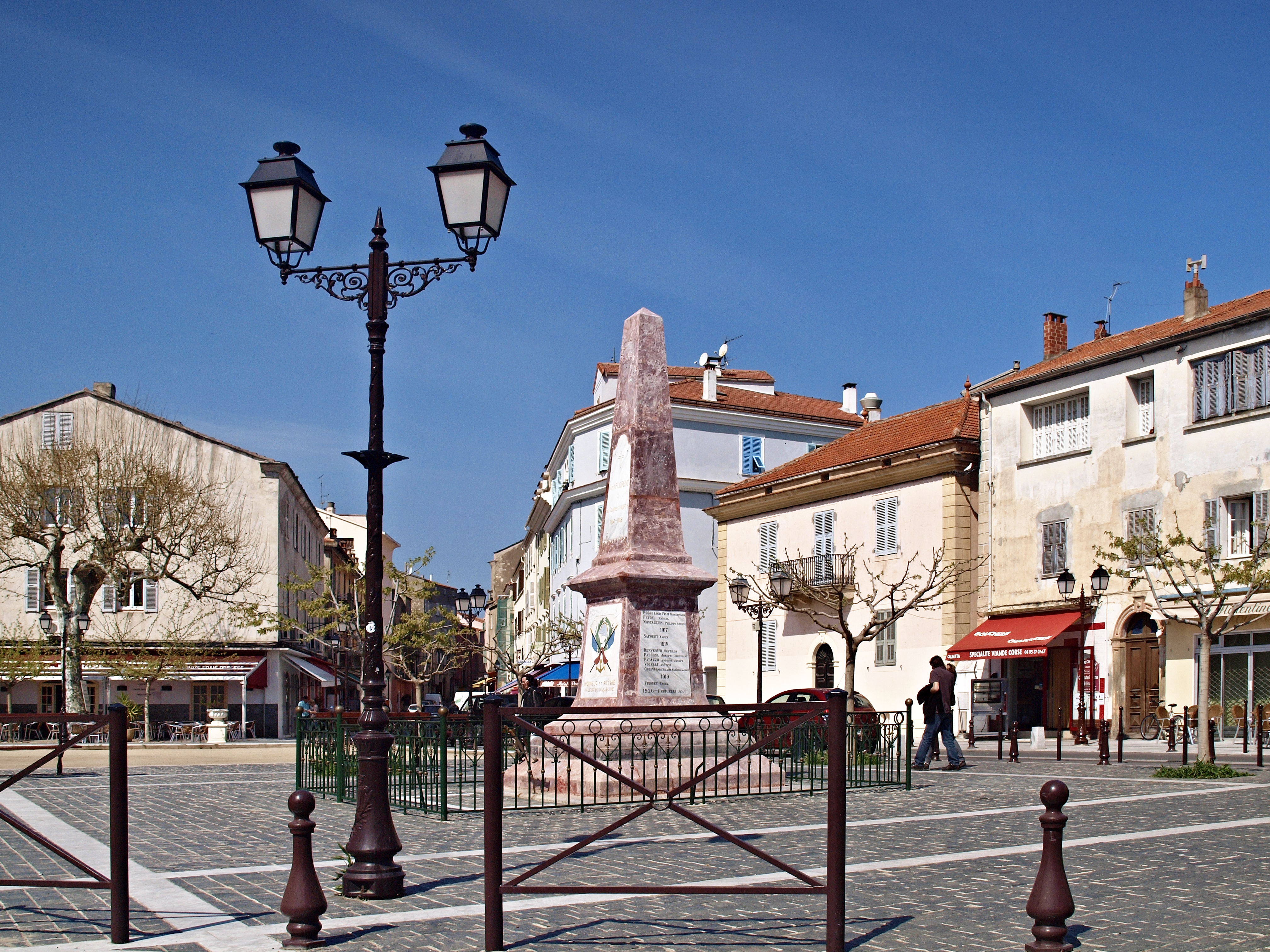 Monument aux morts et lampadaire console à deux têtes équipé de lanternes posées traditionnelles, vitrées à 4 faces, Place des Portes, Saint-Florent (Corsica)